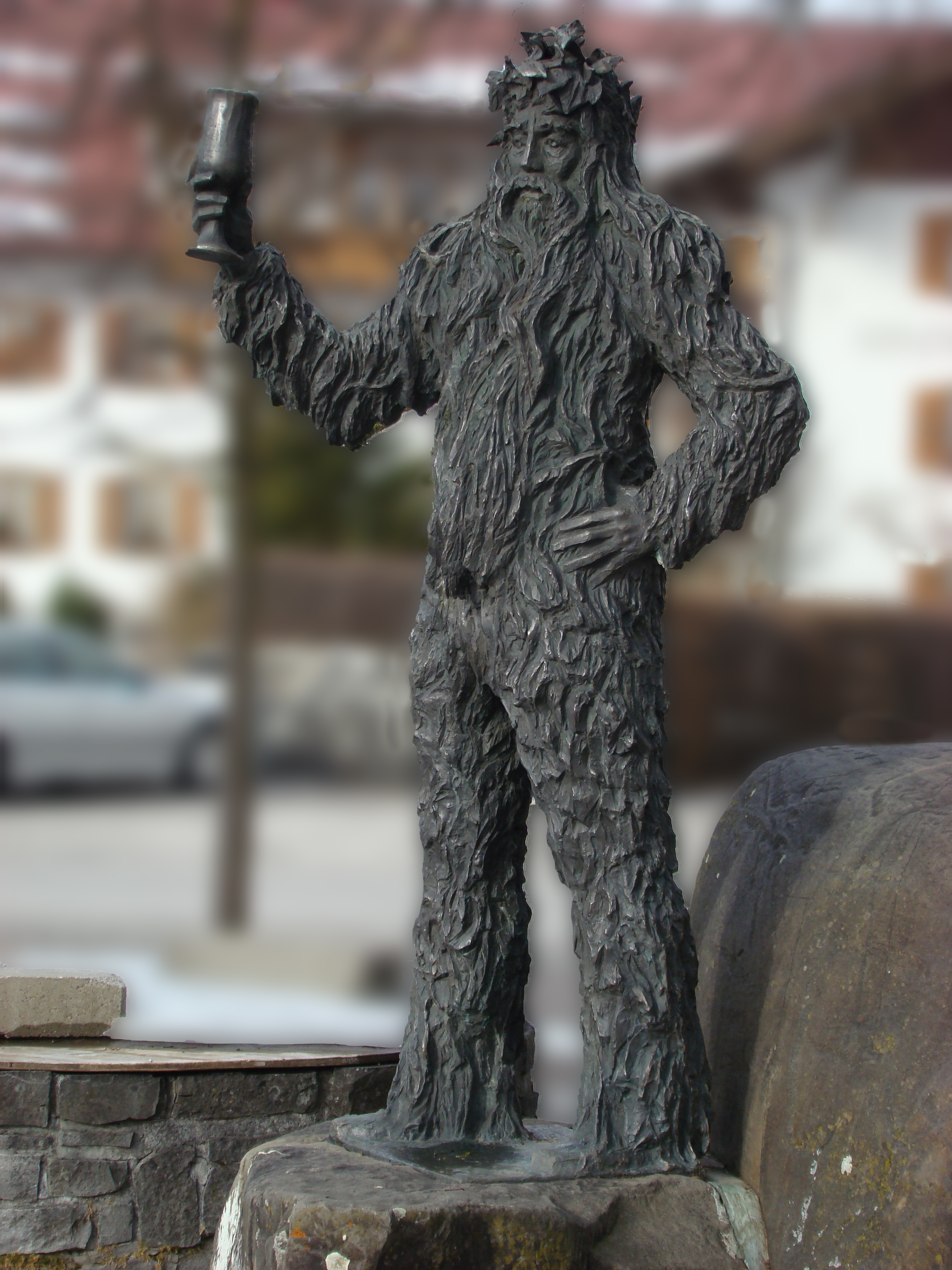 Bronze-Statue das "Wilde Mändle" in Oberstdorf (Allgäu)